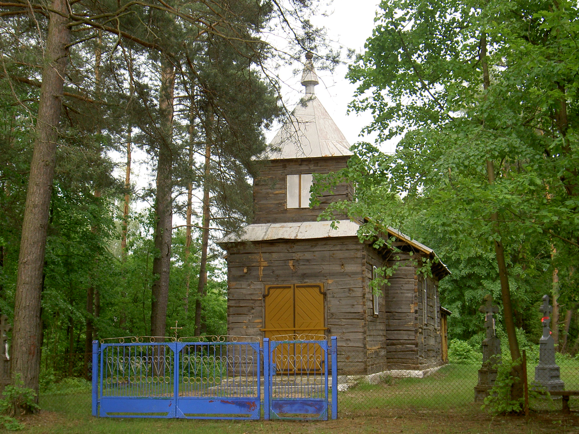 Cerkiew Narodzenia Najświętszej Maryi Panny w Opace Dużej.